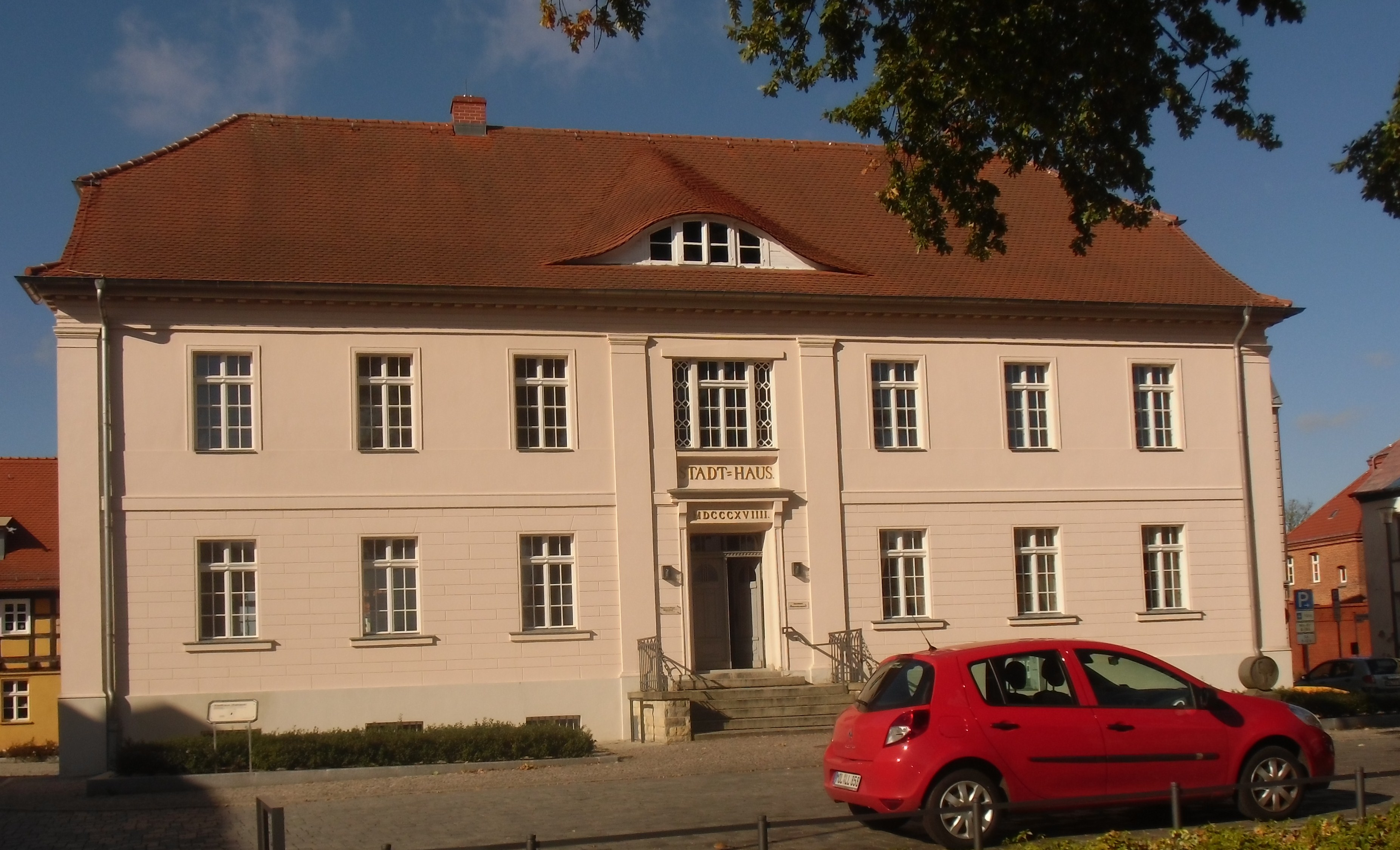 Denkmalgeschütztes altes Rathaus (Stadthaus) am Markt 10, im klassizistischen Stil 1819-1825 erbaut, Nr. 8 in der Liste der Baudenkmale in Strausberg